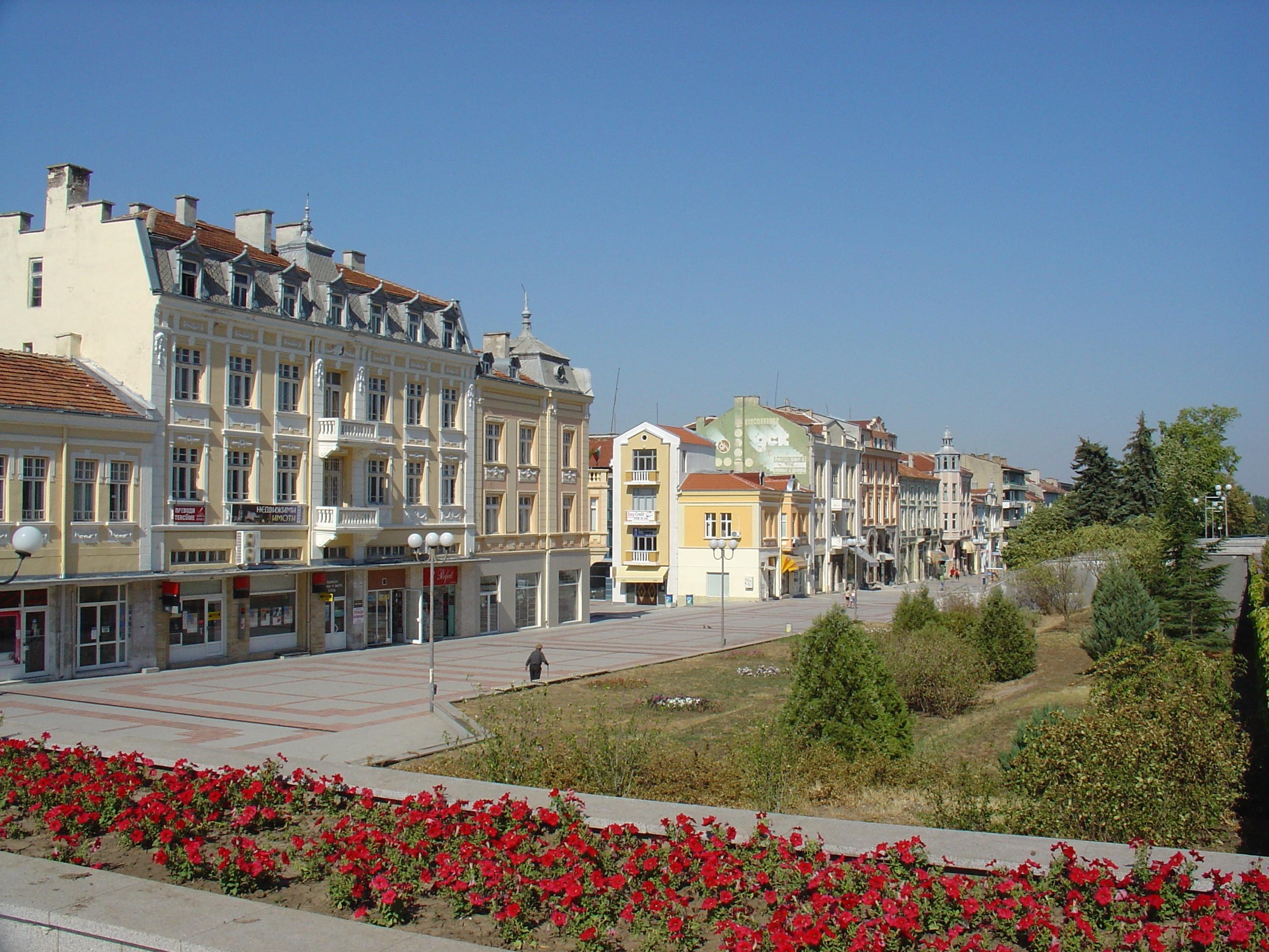 Ville de Choumen (Sumen) - Bulgarie. Avenue de l'école militaire